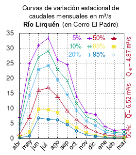 Curvas de variación estacional del río Lirquén en Cerro El Padre. # Dirección General de Aguas # Diagnóstico y clasificación de los cursos y cuerpos de agua según objetivos de calidad. Cuenca del río Biobío. # Santiago de Chile # Ministerio de Obras Públicas (Chile) # 2004 # url: # urlarchivo: # Tabla 4.3: Estación Lirquén en Cerro el Padre pág. 72 mes 5% 10% 20% 50% 85% 95% abr 6.97 4.87 3.14 1.34 0.44 0.21 may 24.85 19.65 14.35 7.00 2.15 0.87 jun 31.00 27.14 22.88 15.98 9.60 6.82 jul 33.37 29.00 24.27 16.71 9.57 6.25 ago 26.09 22.96 19.50 13.85 8.54 6.19 sep 24.45 19.21 14.54 8.99 5.63 4.59 oct 14.00 11.68 9.35 6.06 3.47 2.44 nov 8.52 7.22 5.83 3.68 1.86 1.16 dic 7.97 5.96 4.19 2.14 0.93 0.57 ene 3.83 2.90 2.08 1.08 0.47 0.28 feb 2.50 1.93 1.41 0.75 0.32 0.18 mar 2.95 2.08 1.37 0.61 0.23 0.13 This plot was created with Gnuplot.